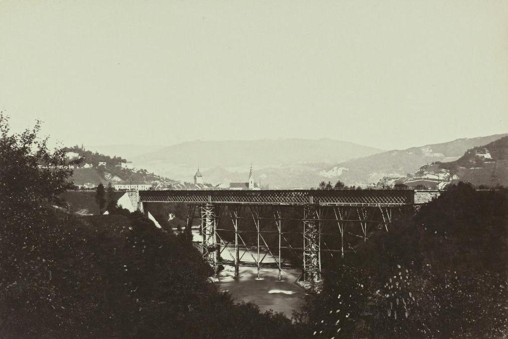 Bahnstrecke Baden-Niederglatt: Untere Limmatbrücke